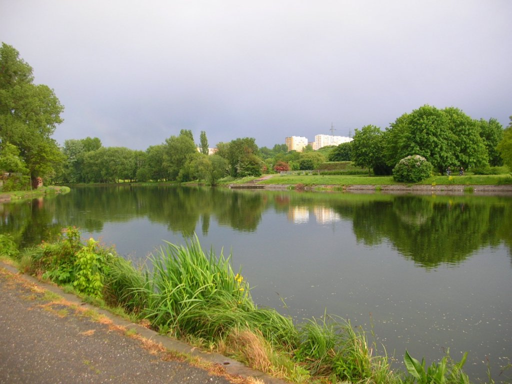 Brda w Bydgoszczy - Skrzetusko